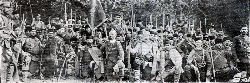 Български Генерал Иван Цончев (1858-1910) с четата си. Deutsch Iwan Zontschew (1858-1910) mit seiner Tscheta